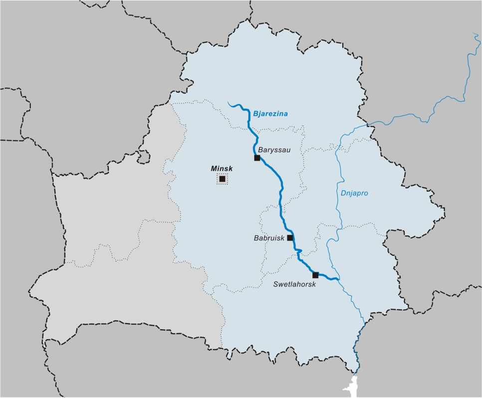 Karte selbst erstellt, varp Lage des Flusses Bjaresina (Beresina) in Weißrussland